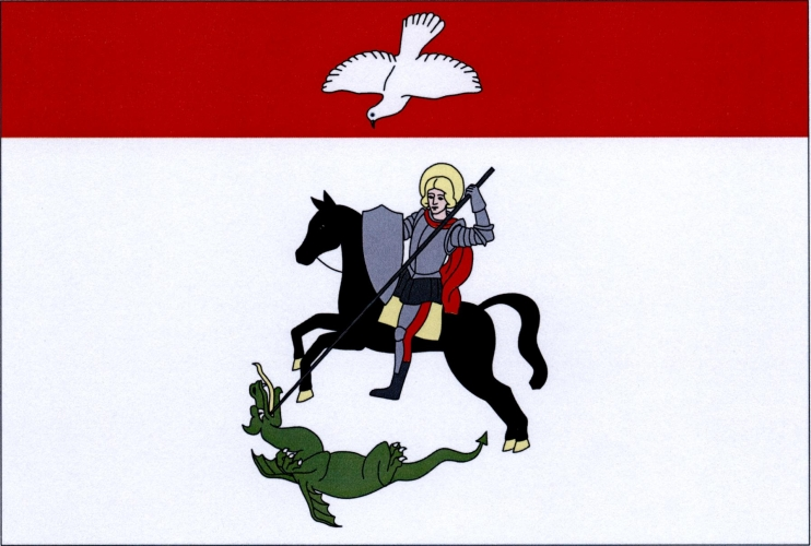 vlajka, Dolní Čermná, okres Ústí nad Orlicí